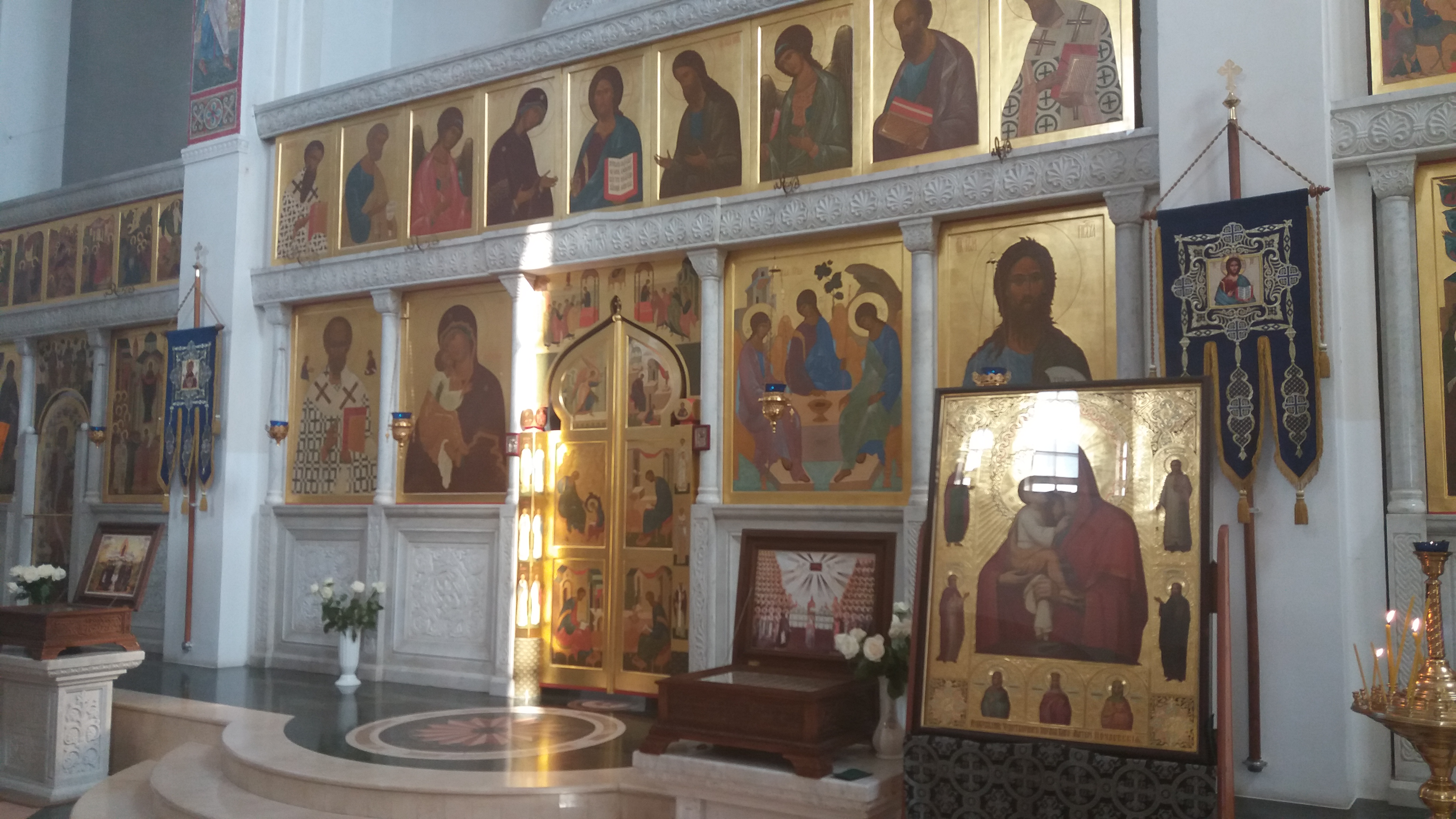 Кафедральний собор Віри, Надії, Любові і матері їх Софії